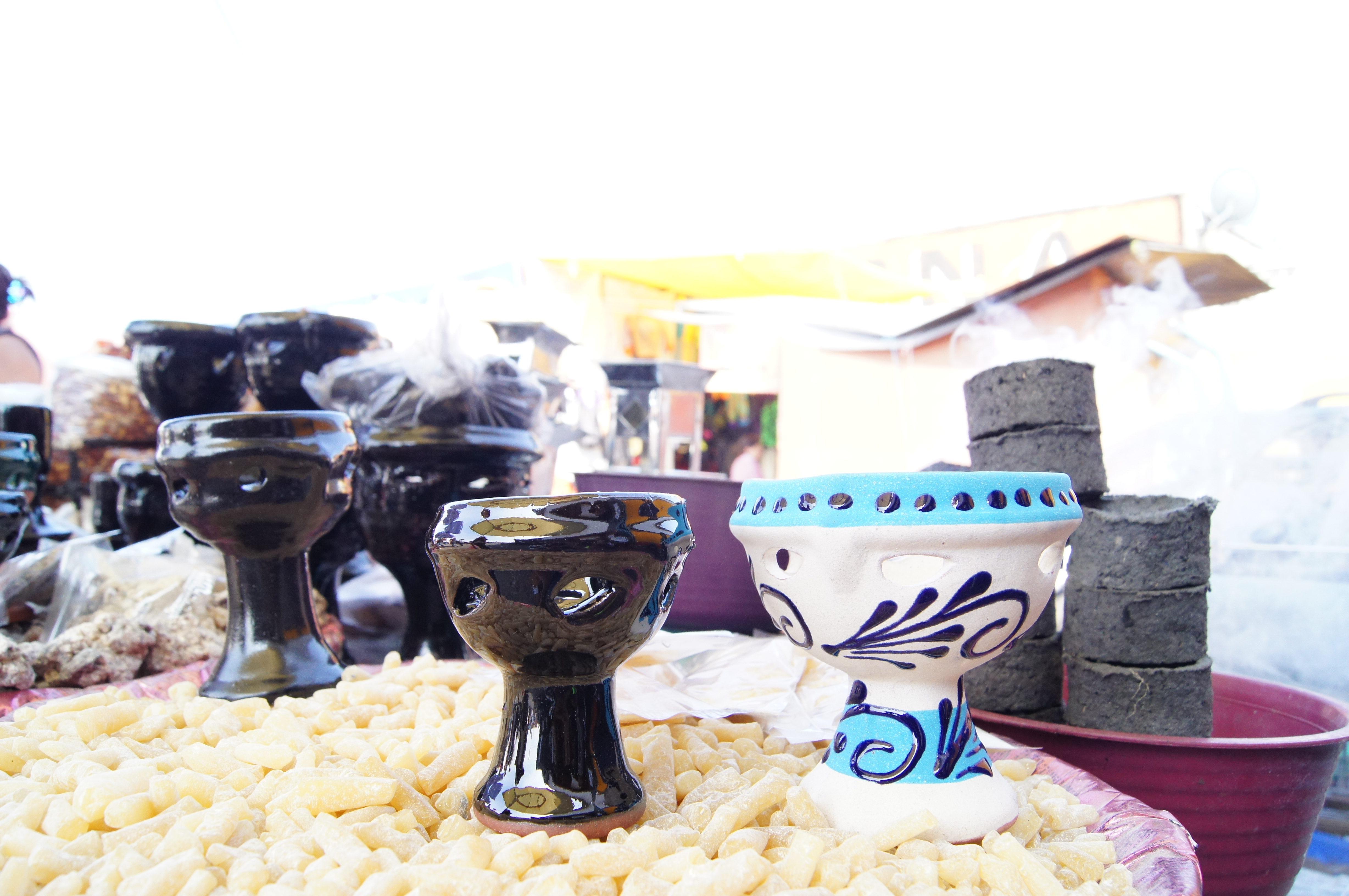 para atraer a mis seres queridos